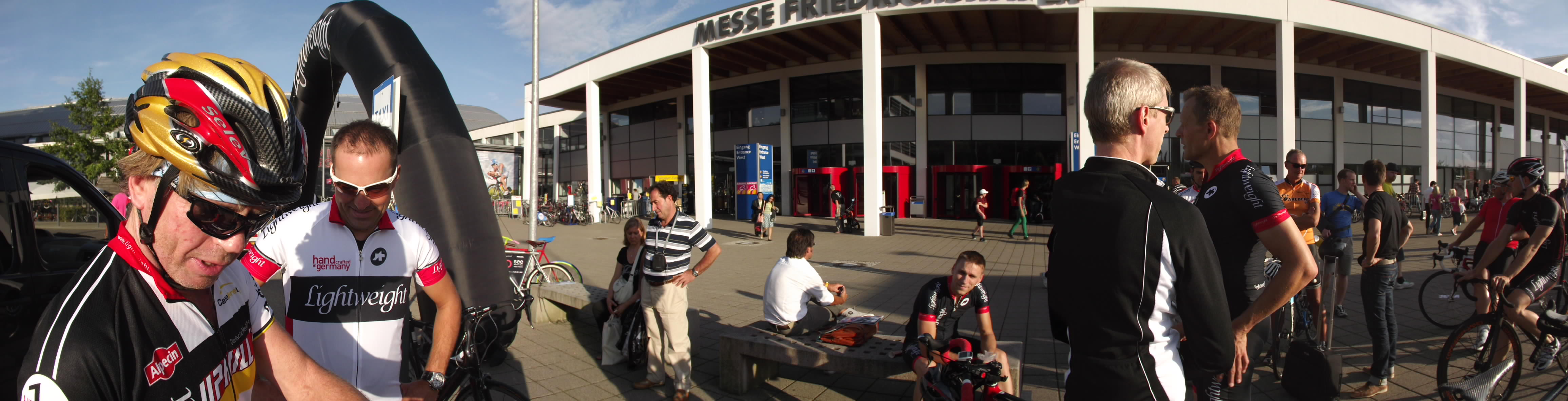 Eurobike Messeeingang West